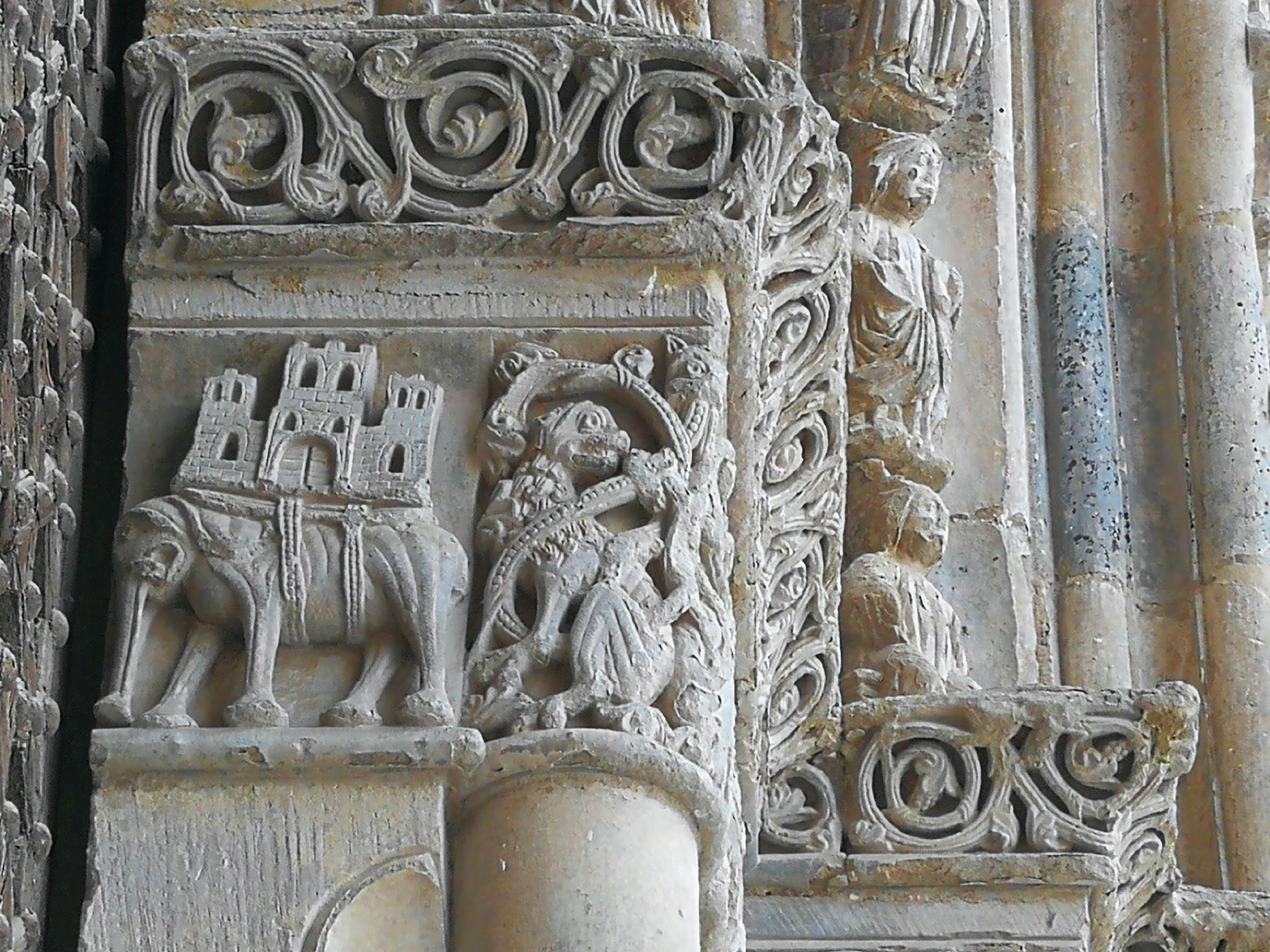 Capitel junto a la puerta de acceso en la iglesia de Santa María de Agramunt, Lérida